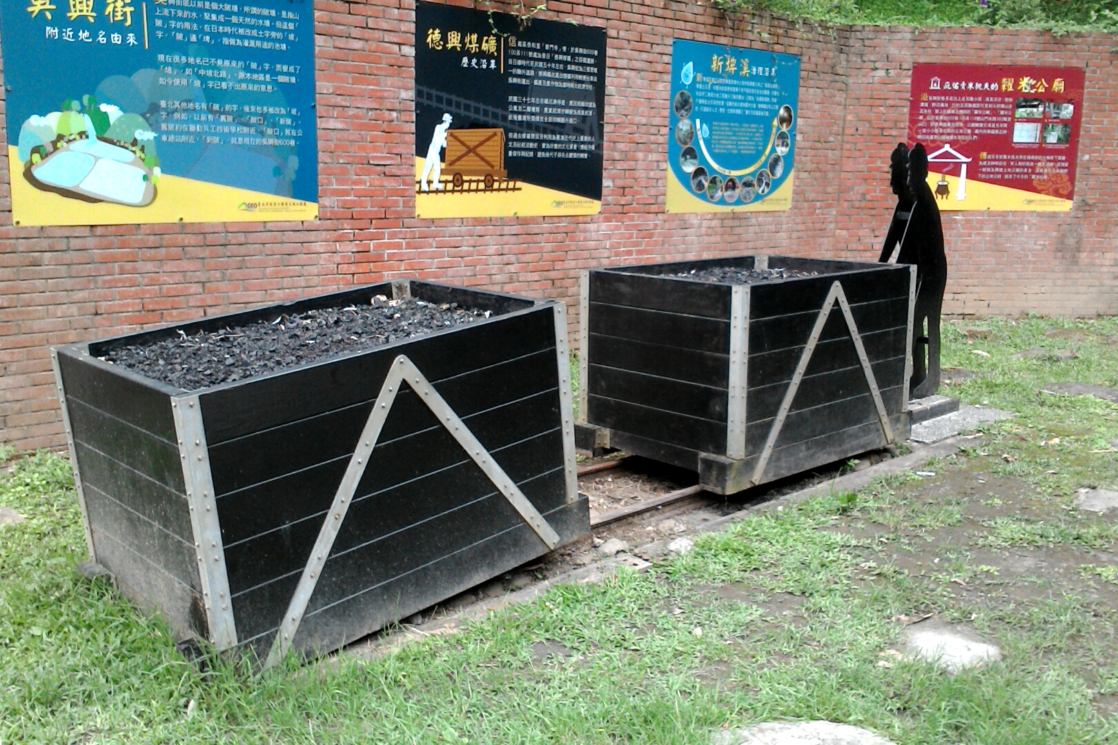 德興煤礦展示的台車,台北市信義區吳興次分區泰和里